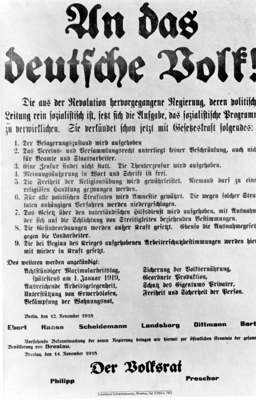 Bekanntmachung "An das Deutsche Volk!" Tgb. 5562/38 Eins: Kreishauptstellenleiter Dr. Gündel, Breslau